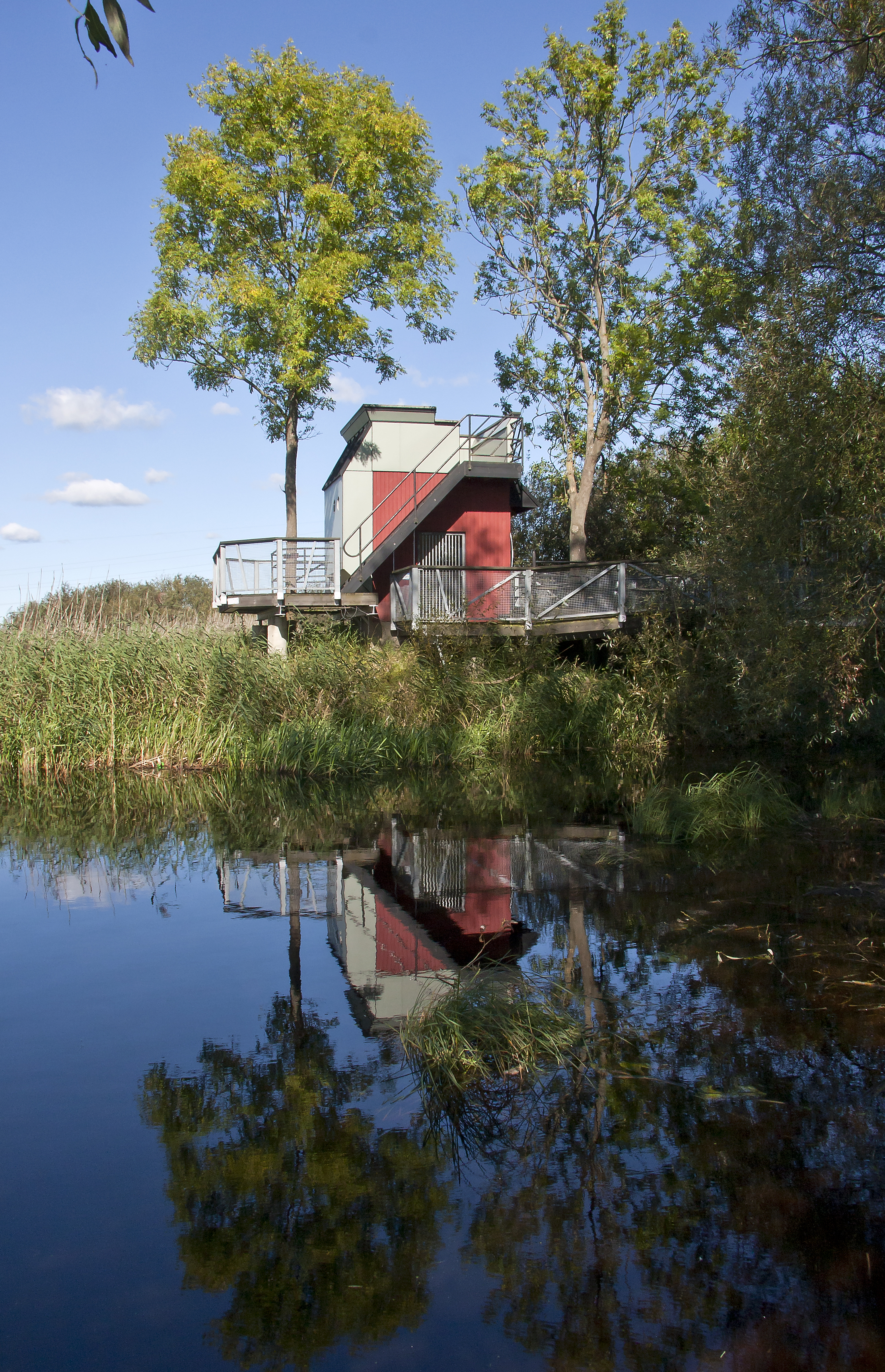 Kanalhuset i Kristianstad med utsikt över Vattenriket.